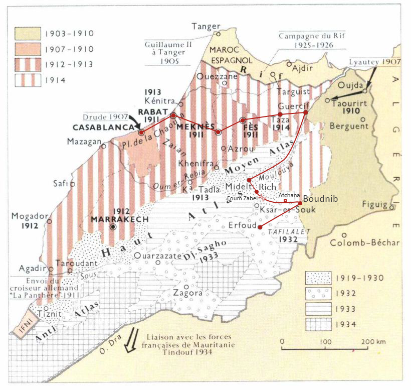 Parcours d'Albert Chemin entre Casablanca et Erfoud (1931), dessiné sur une carte représentant la Campagne de pacification du Maroc.